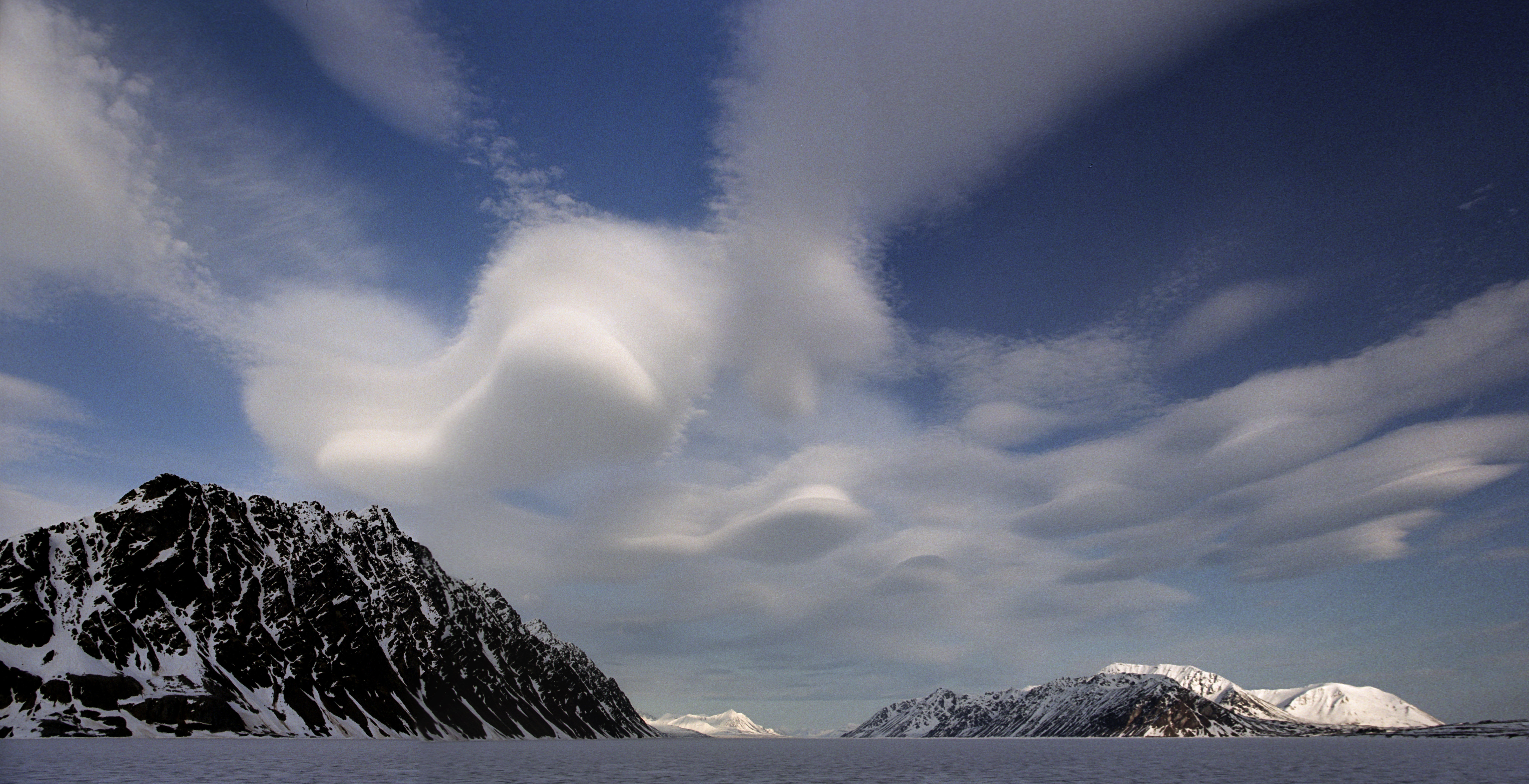 Lilliehöökfjorden, Svalbard